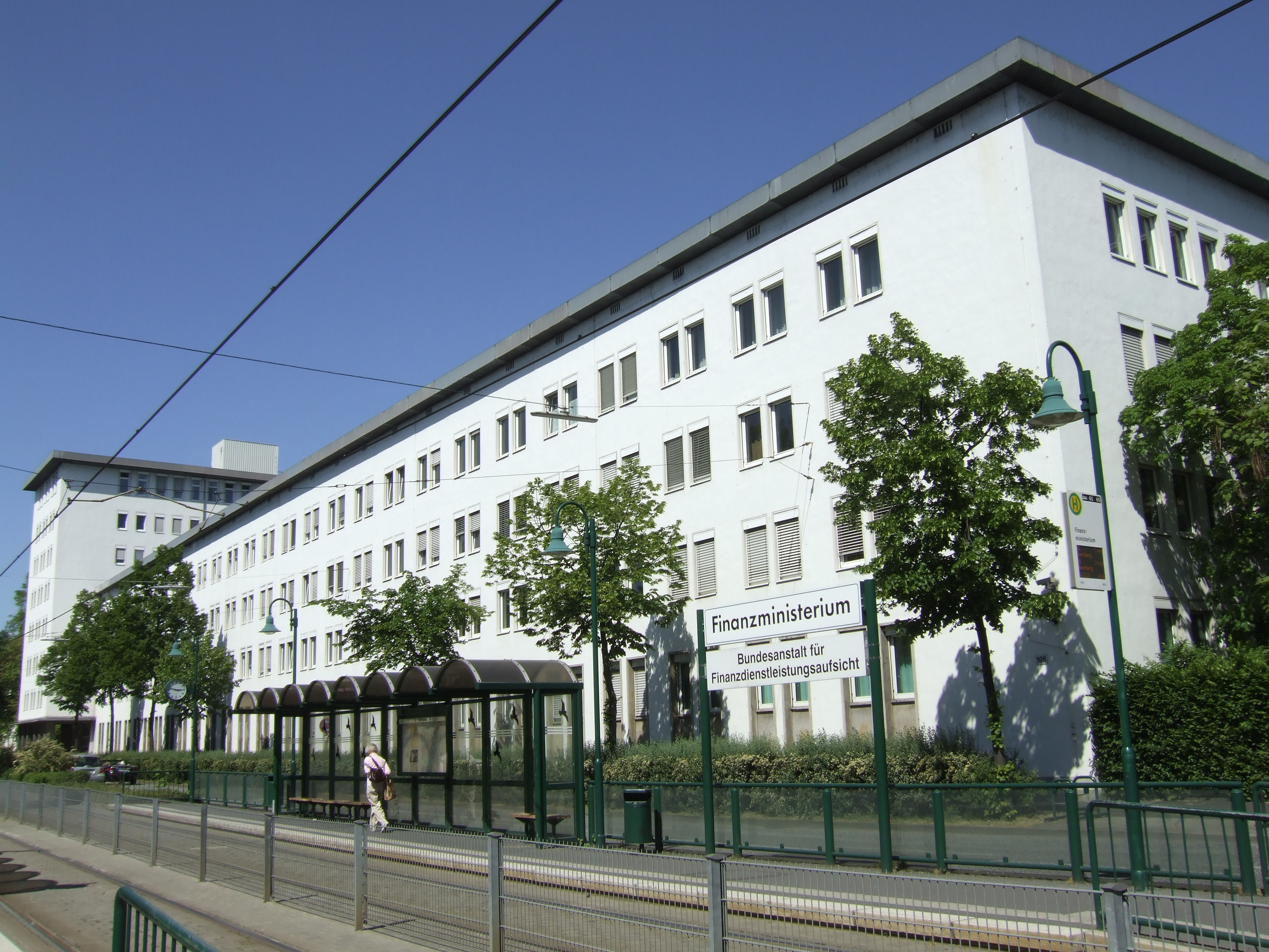 Bundesanstalt für Finanzdienstleistungsaufsicht, Bonn-Castell